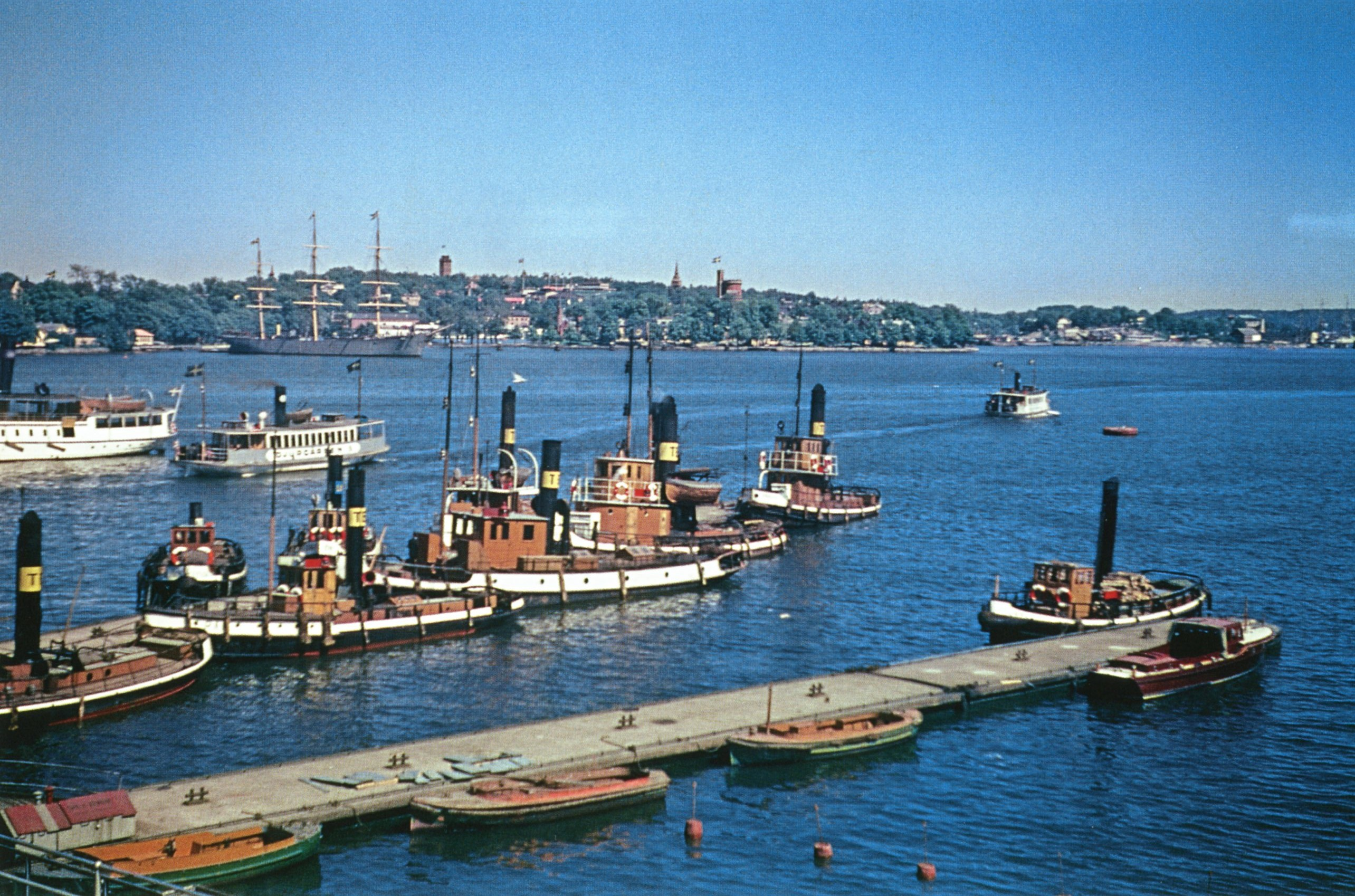 Transportbolagets bogserbåtar i Franska bukten, Stockholm